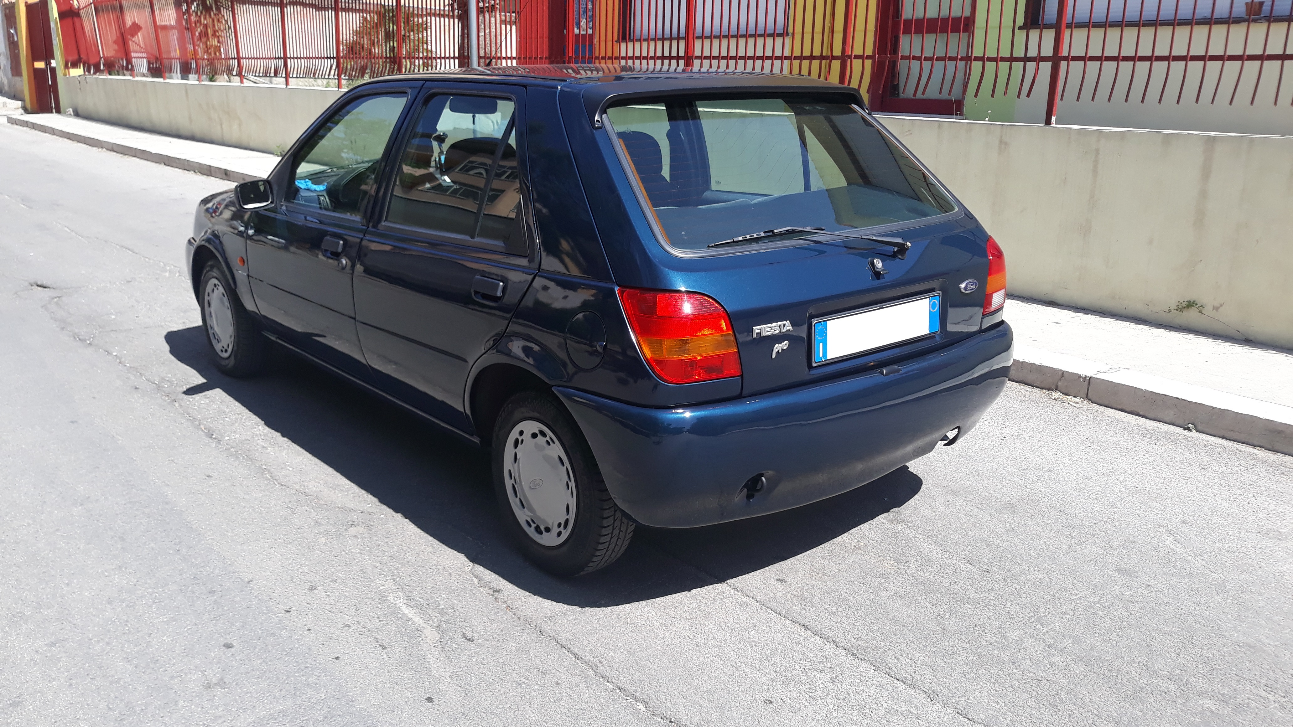 Ford Fiesta Pro (vista posteriore)